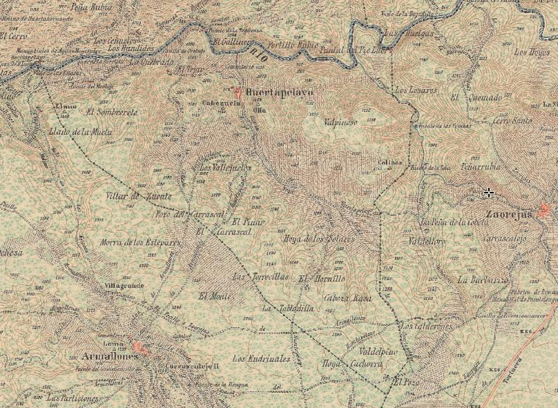 Mapa histórico del Instituto Geográfico Nacional donde se pueden observar los límites de la pedanía de Huertapelayo.